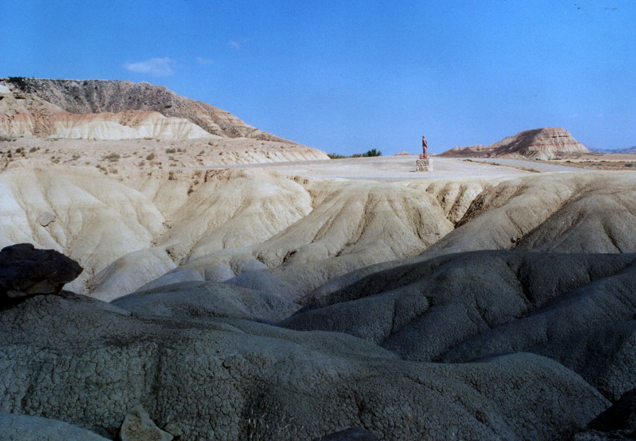 Bardenas Reales, Navarra, Spain